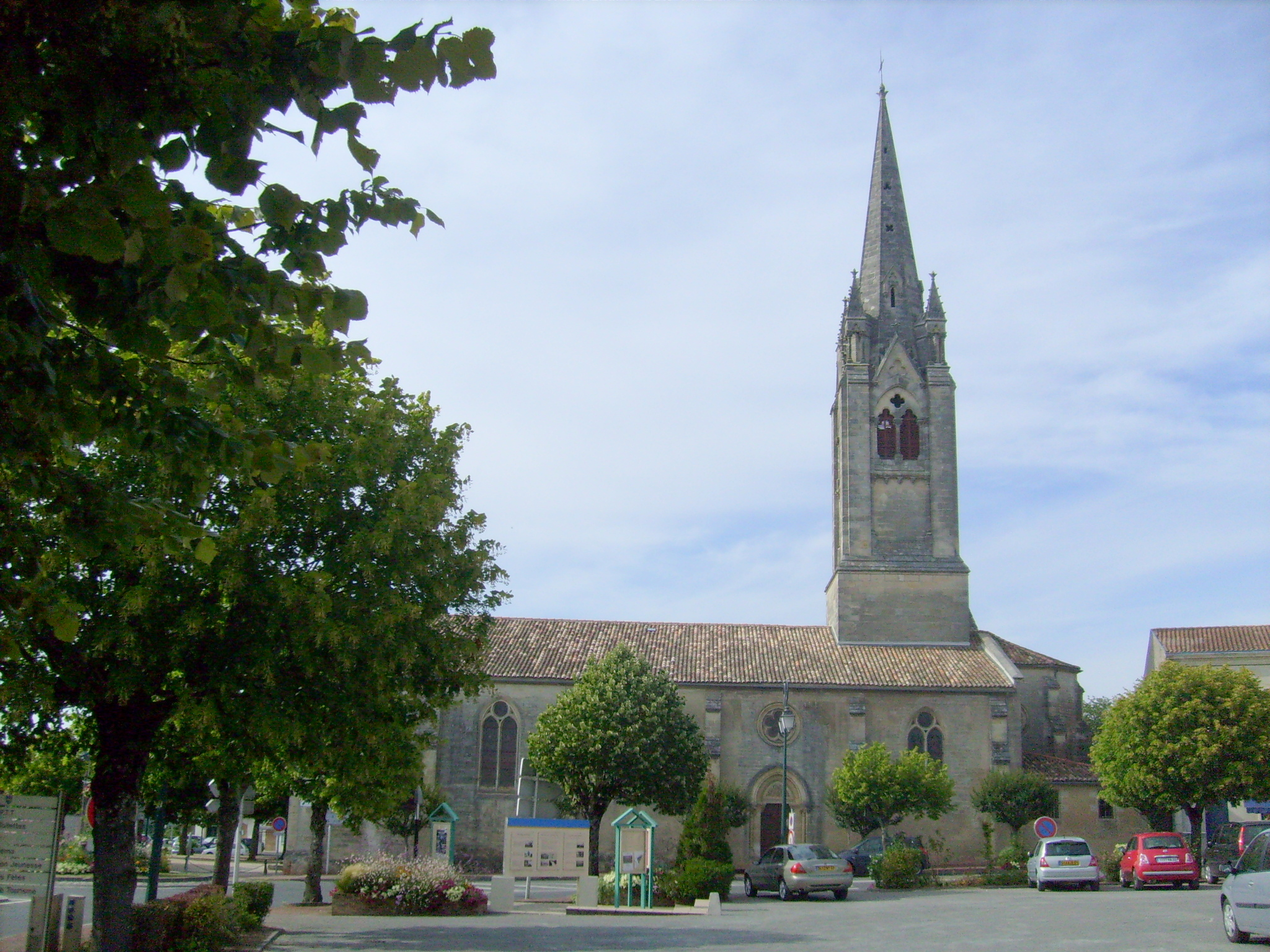 L'église de Saint-Ciers-sur-Gironde